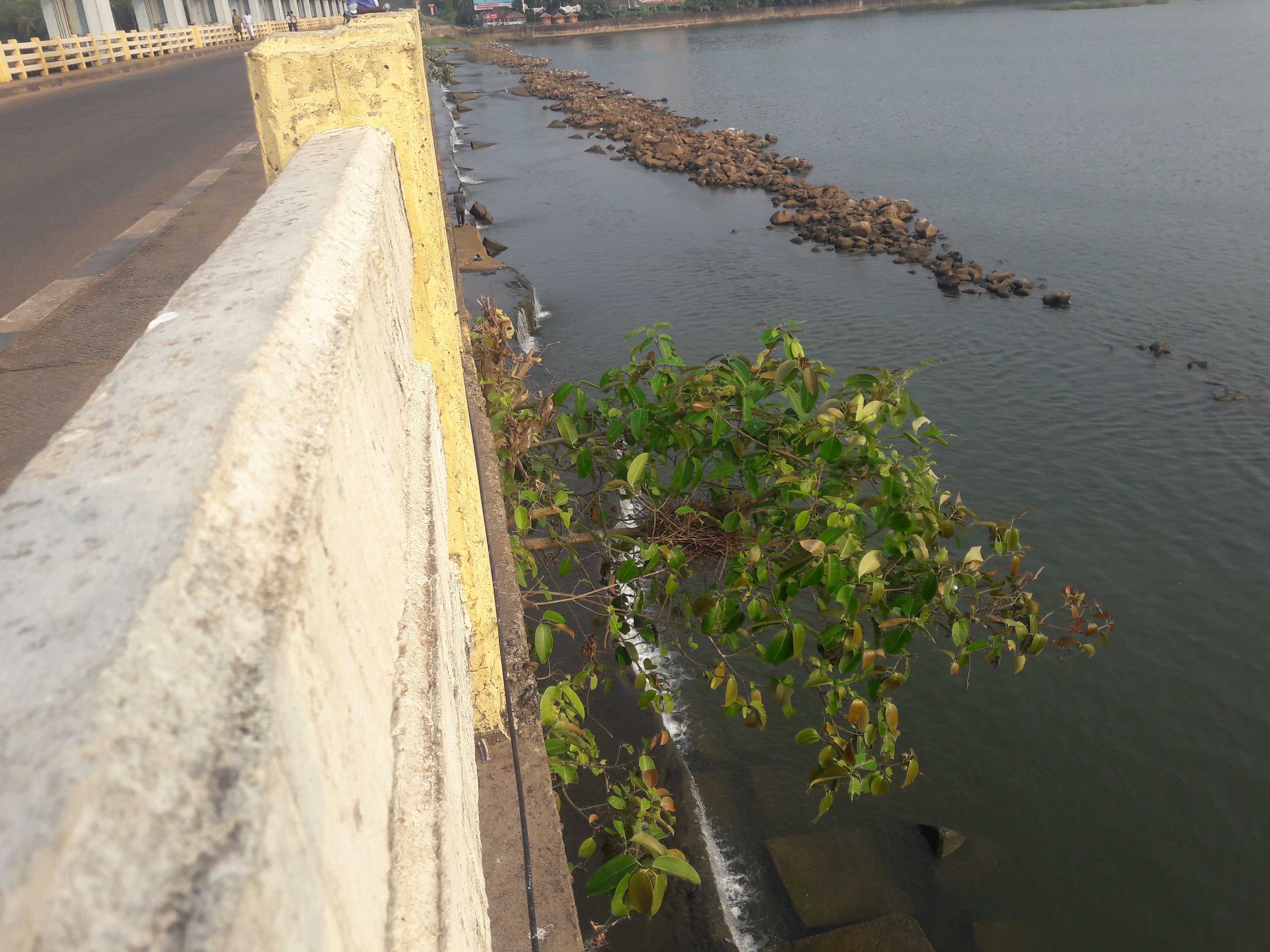 മലപ്പുറം ജില്ലയില്‍ ചമ്രവട്ടം പാലത്തിന്മേലെ ഒരു കൊയലി മരം വളരുന്നു. ശാസ്ത്രീയ നാമം Ficus amplissima കുടുംബം Moraceae.